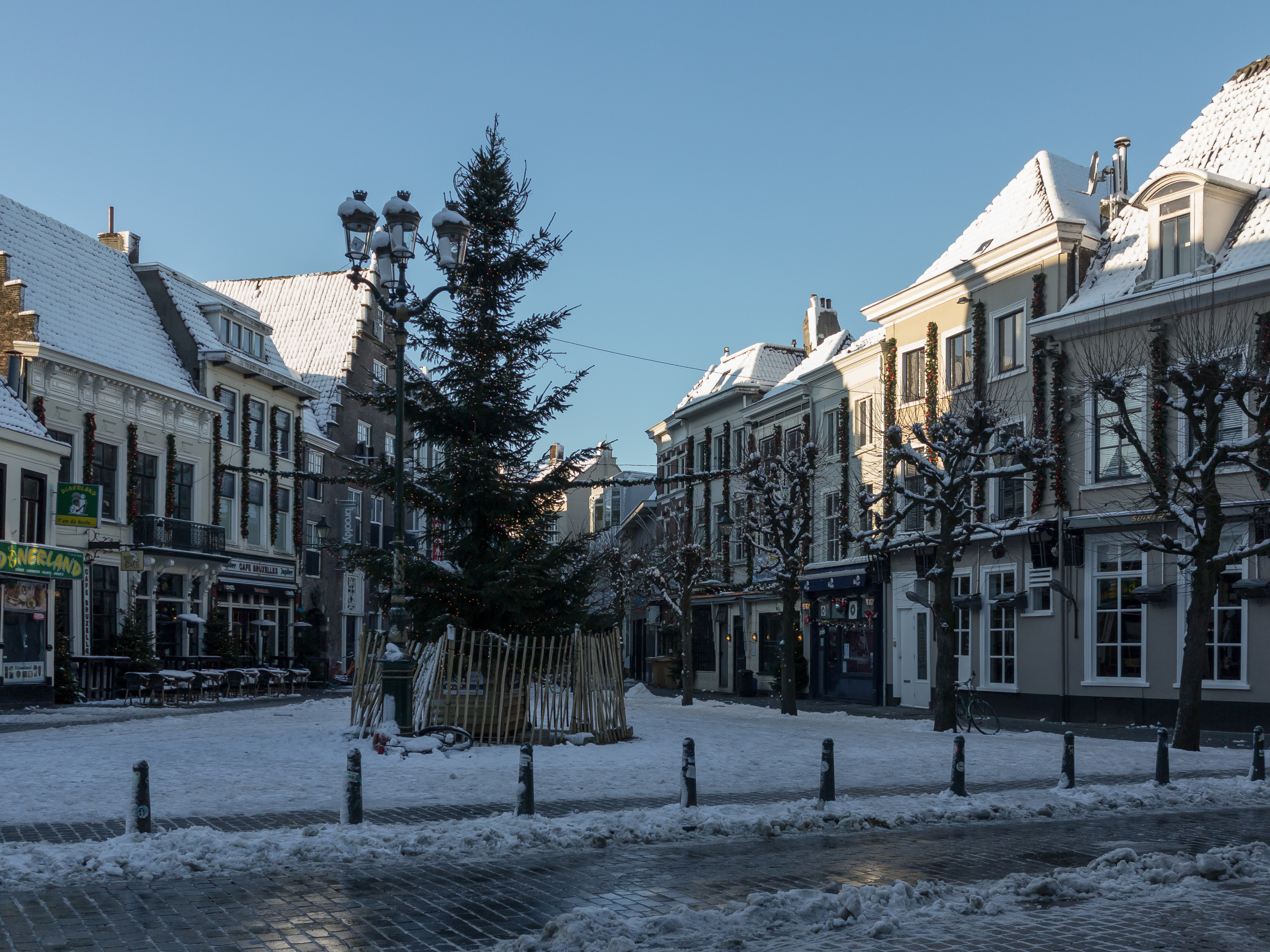 Zicht op een deel van de Havermarkt, Breda met kerstboom en sneeuw. Gelegen nabij het centrum van Breda.